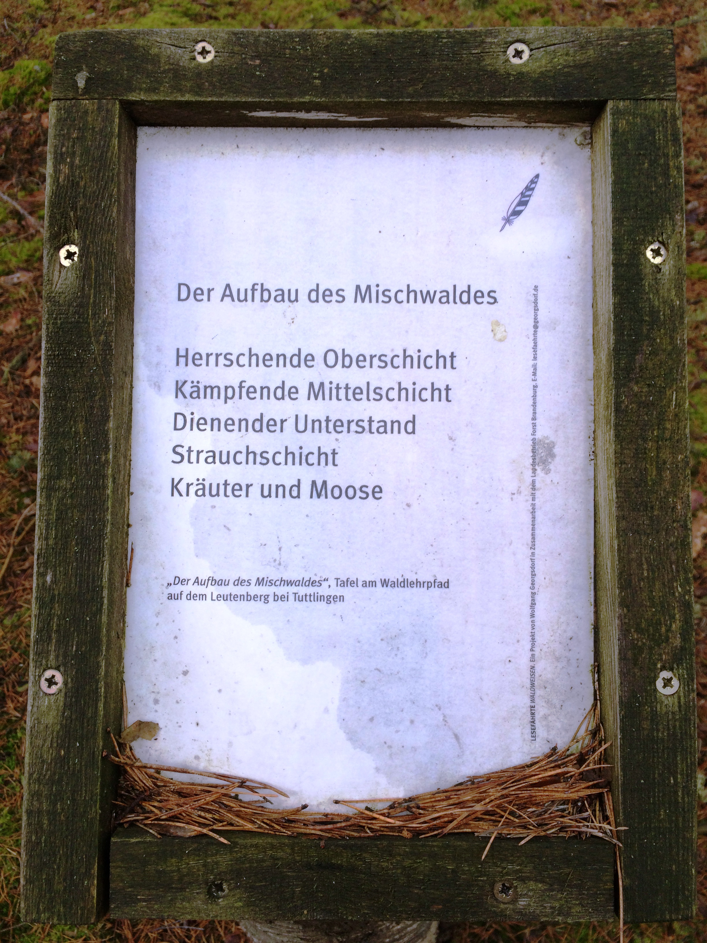 Die Lesefährten Waldweisen ist ein rund 20 km langer touristischer Lehrpfad in Märkisch Buchholz im Landkreis Dahme-Spreewald in Brandenburg. Der Landesbetrieb Forst Brandenburg hat entlang des Weges gemeinsam mit dem österreichischen Künstler Wolfgang Georgsdorf insgesamt 50 Tafeln mit literarischen Texten aufgestellt, die alle das Thema Wald aufgreifen.